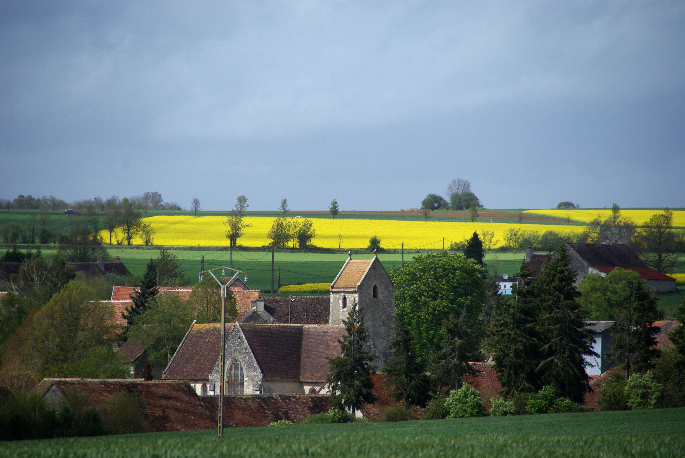 Le village de Vezot vu dela voie romaine.